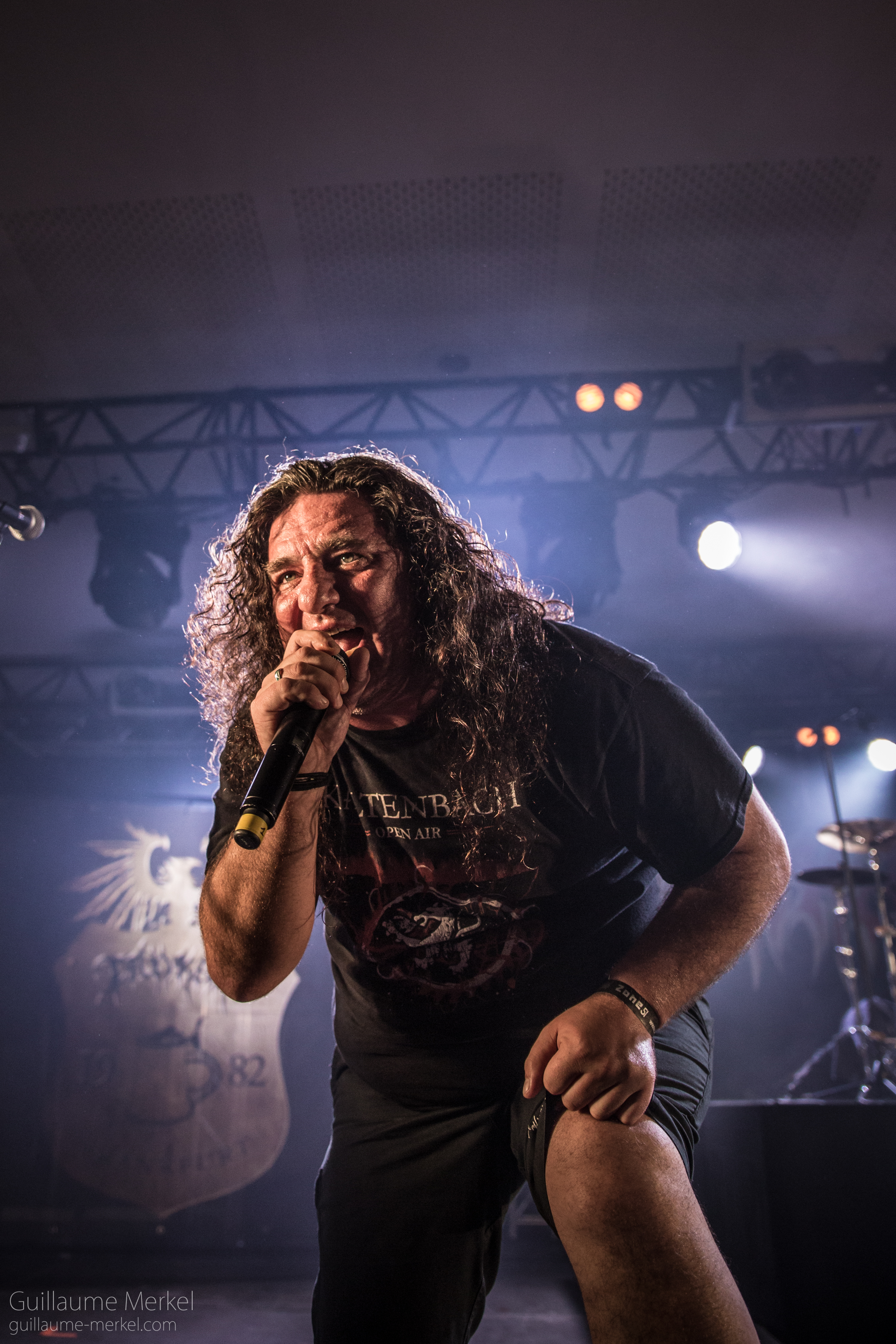 Tankard à Selestat en 2017